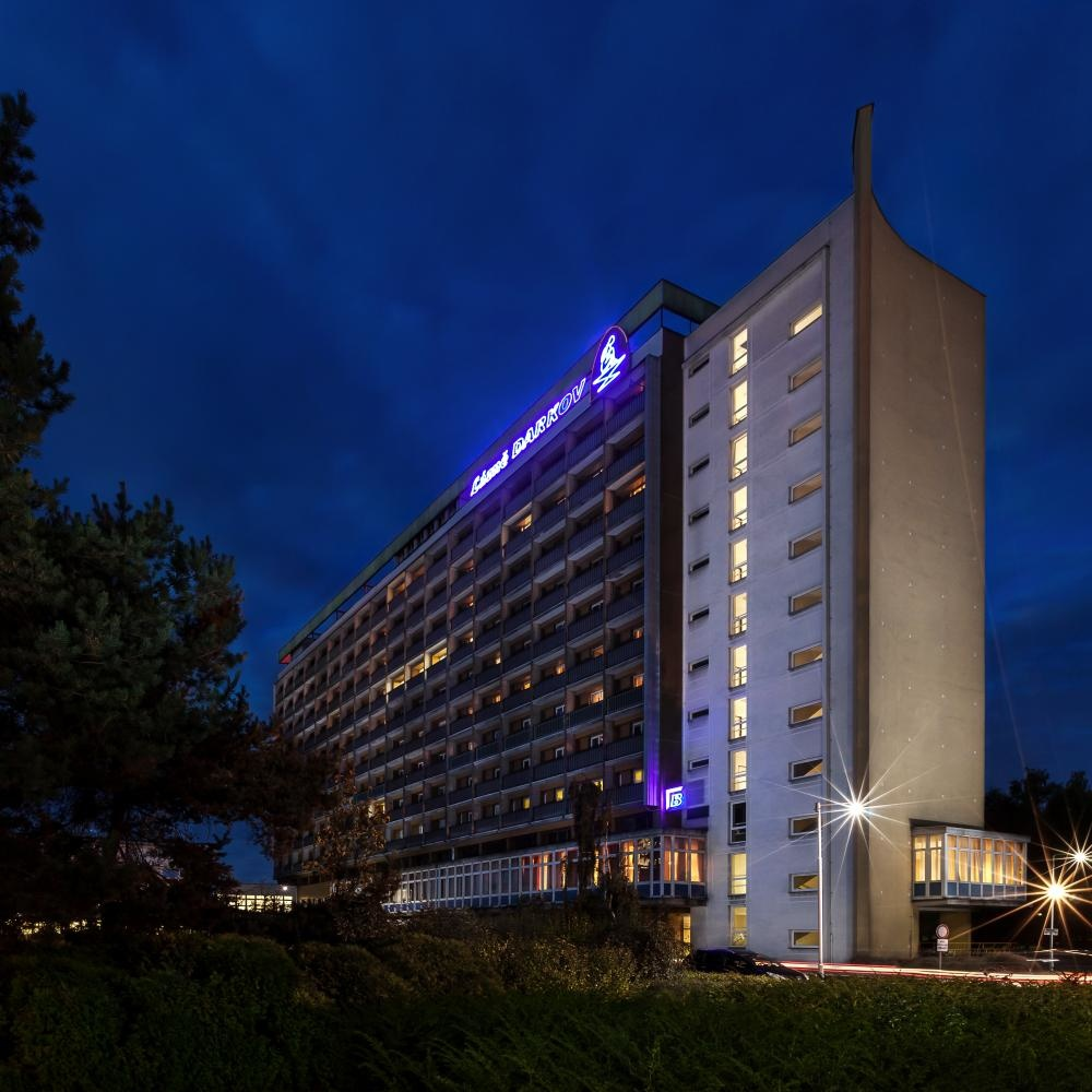 Jeden ze dvou výškových bloků Lázní Darkov v Karviné